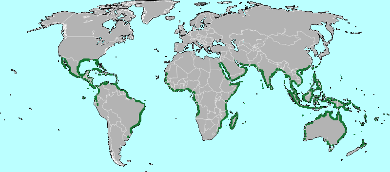 Karte des Mangrovenbiom